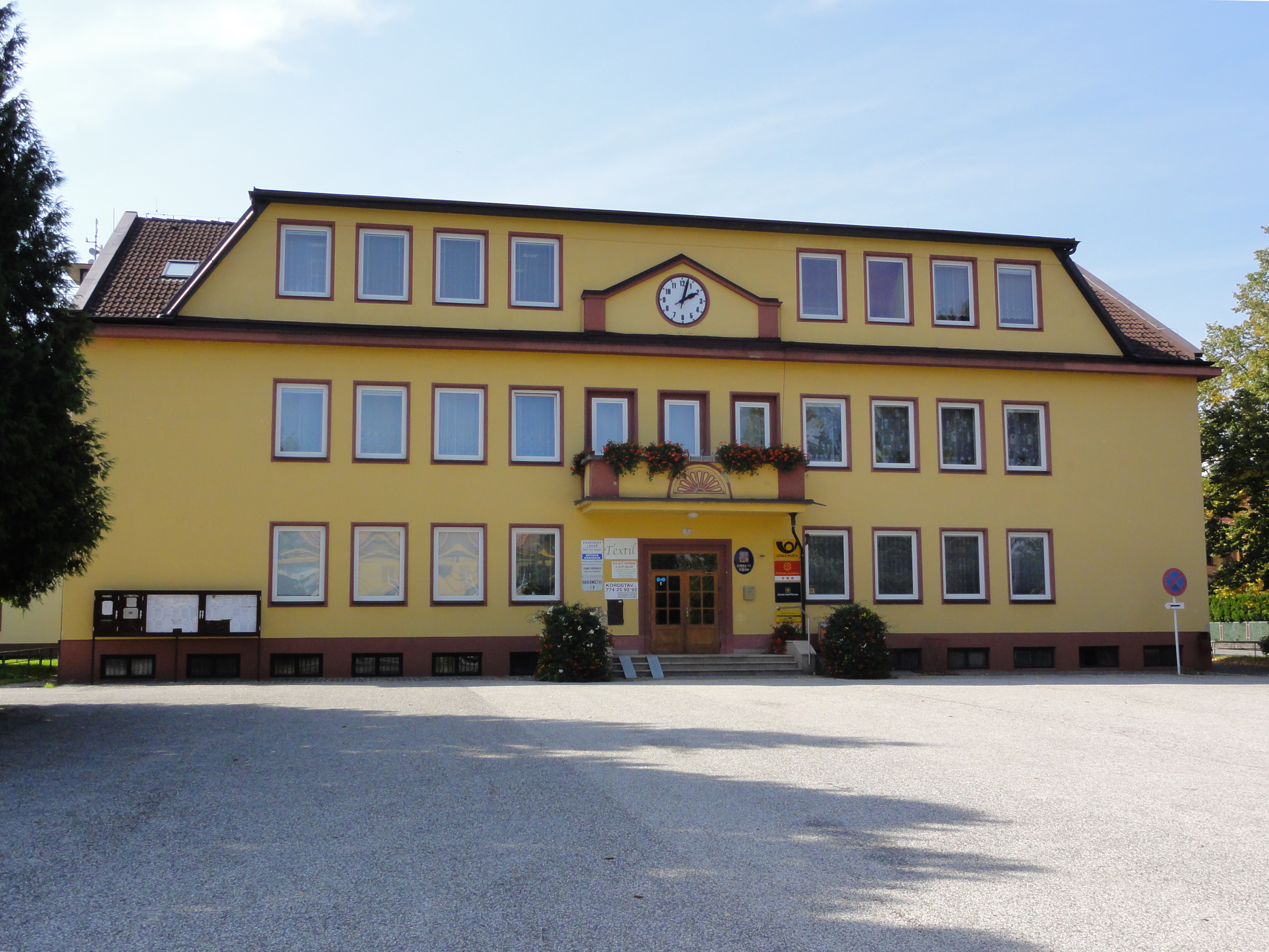 Urząd Gminy w Łucynie